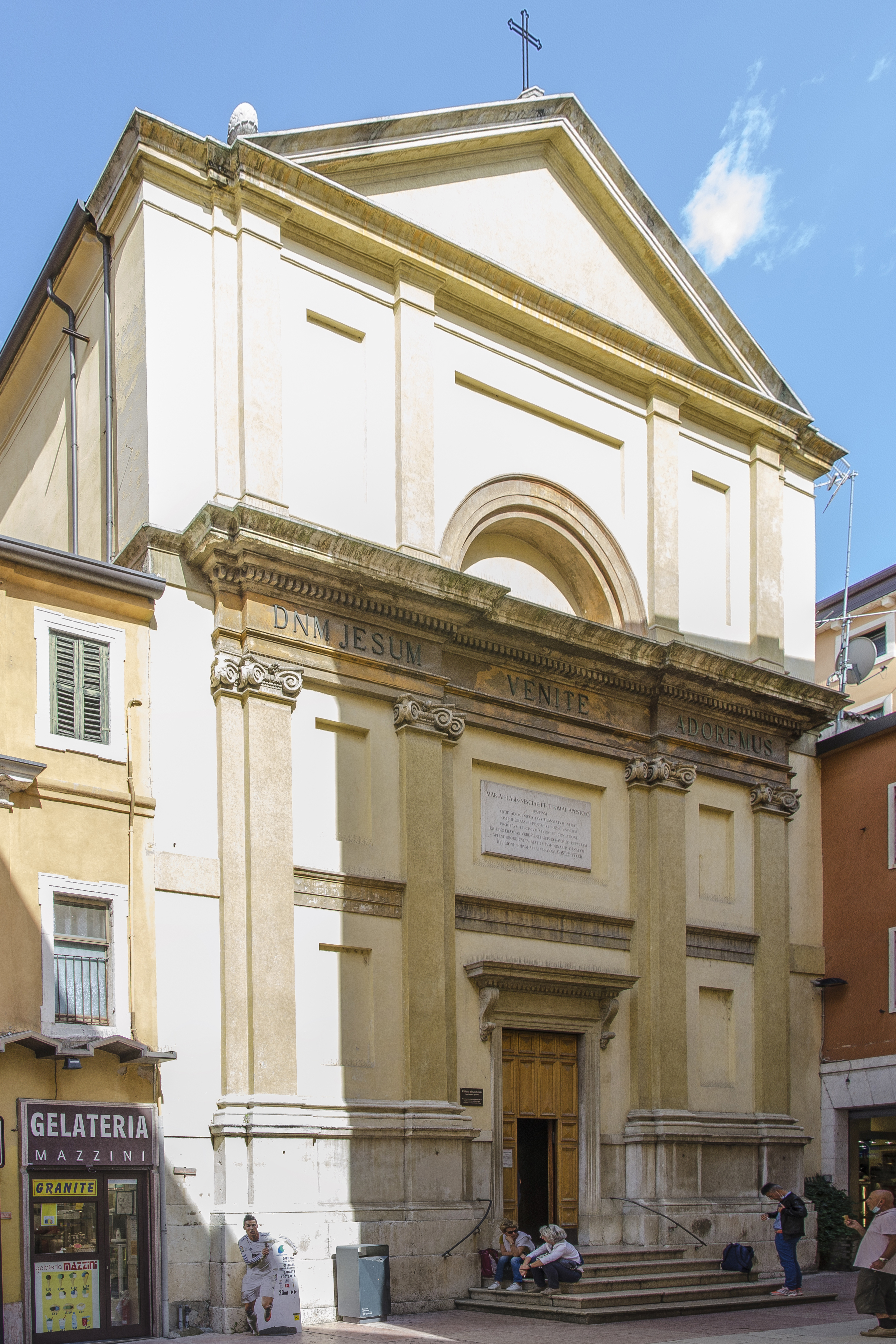 Chiesa di San Tomio a Verona, esterno.